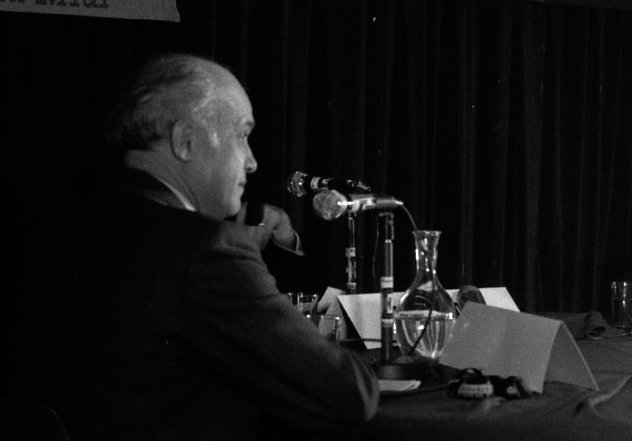 Studio radio Europe1. Le 2 Février 1973. Vue d'un échange entre Monsieur Savary et Monsieur Sanguinetti dans le studio d'Europe 1.